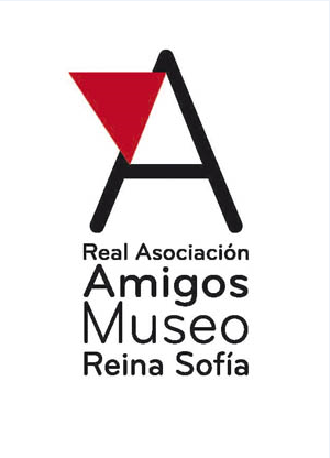 Logo del Real Asociacion Amigos Museo Reina Sofia.